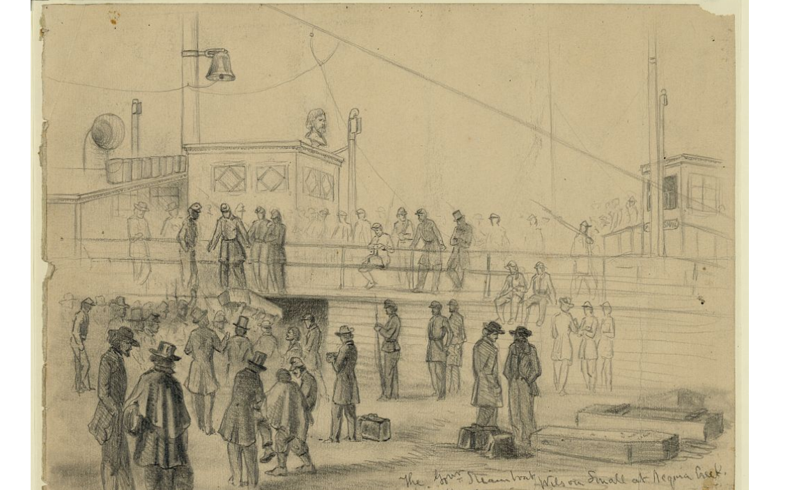 The gov't. steamboat Wilson Small at Acquia [sic] Creek, Mar. 12, 1863. Sanitary Commission, US Civil War